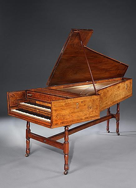 clavecin Kirckman, Londres, 1763